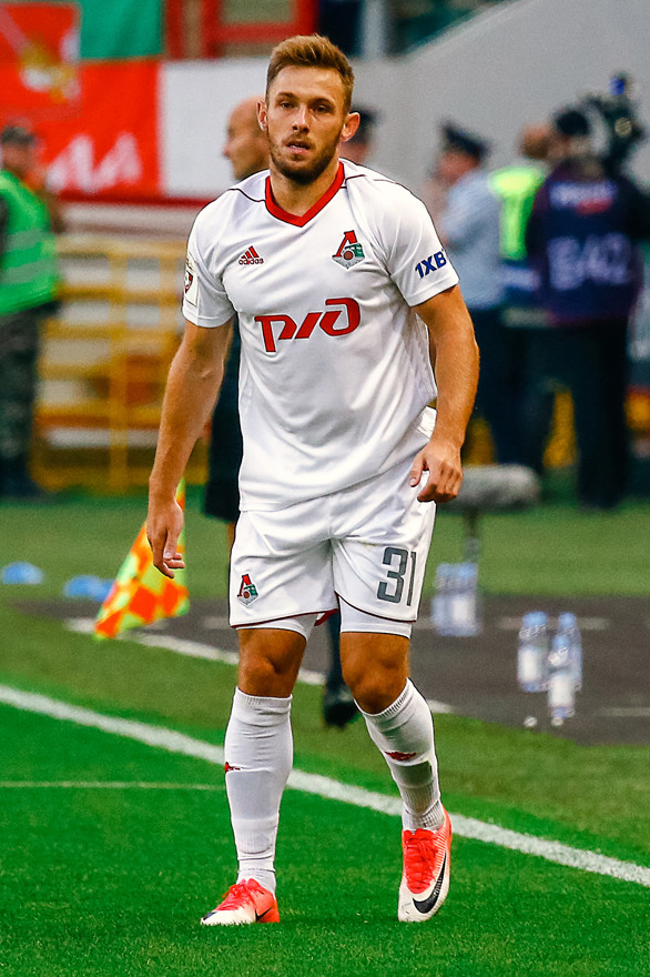 «Локомотив» - «СКА-Хабаровск»